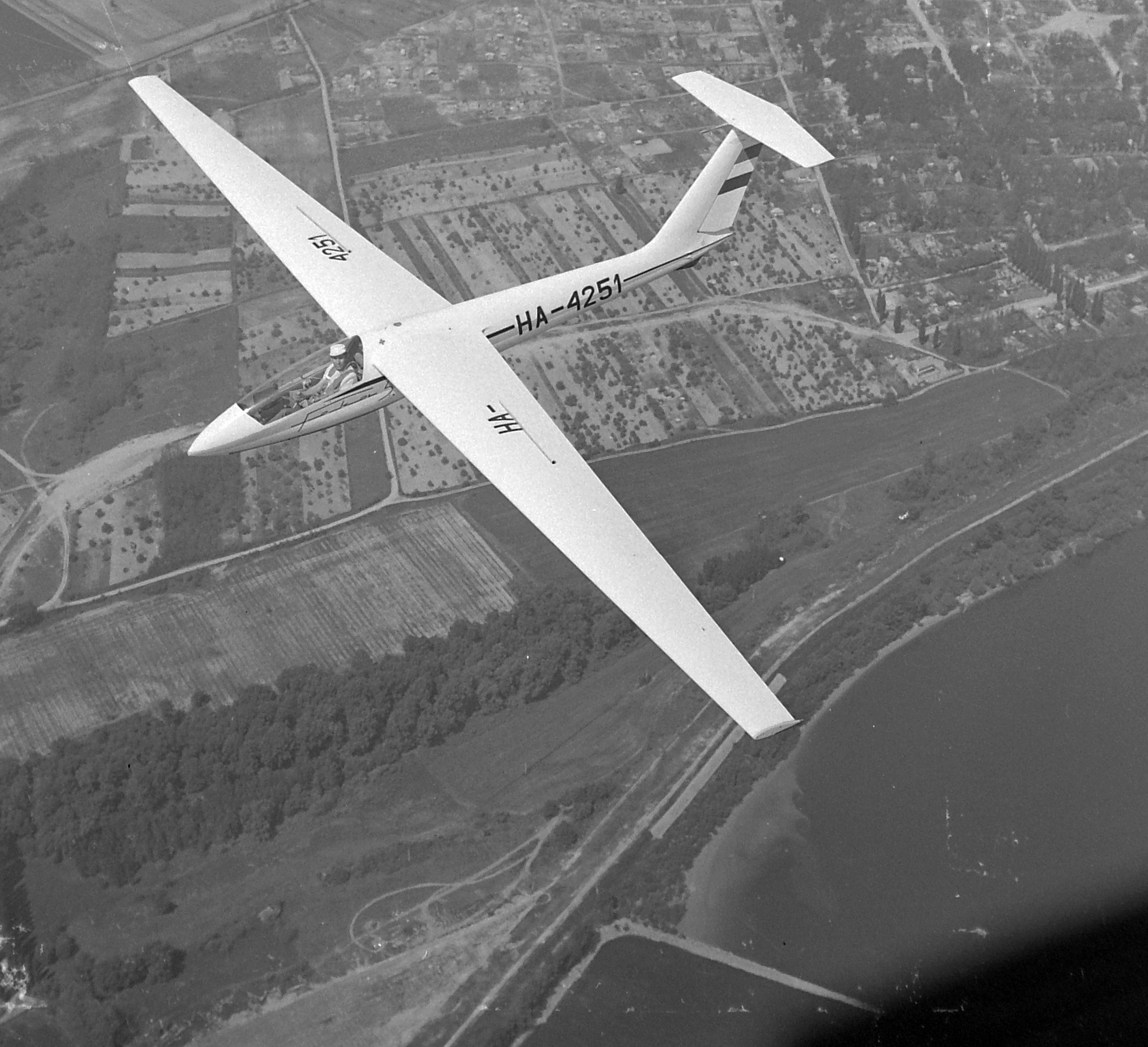 SZD-32 Foka-5 vitorlázó repülőgép. A háttérben a Szentendrei sziget, Surány térsége. Location: Hungary Tags: aerial photo, airplane, sailplane Title: SZD-32 Foka-5 vitorlázó repülőgép. A háttérben a Szentendrei sziget, Surány térsége.